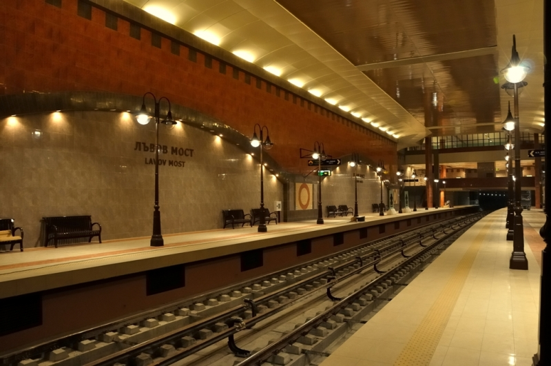 Метростанция Лъвов мост